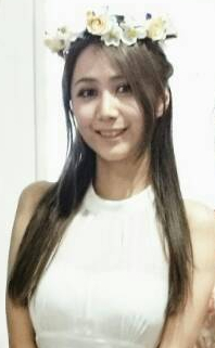 2015年7月18日に大分県別府市の社会福祉法人太陽の家で行われた納涼大会前、同施設内を移動中に撮影させていただいたサラ・オレインさん。